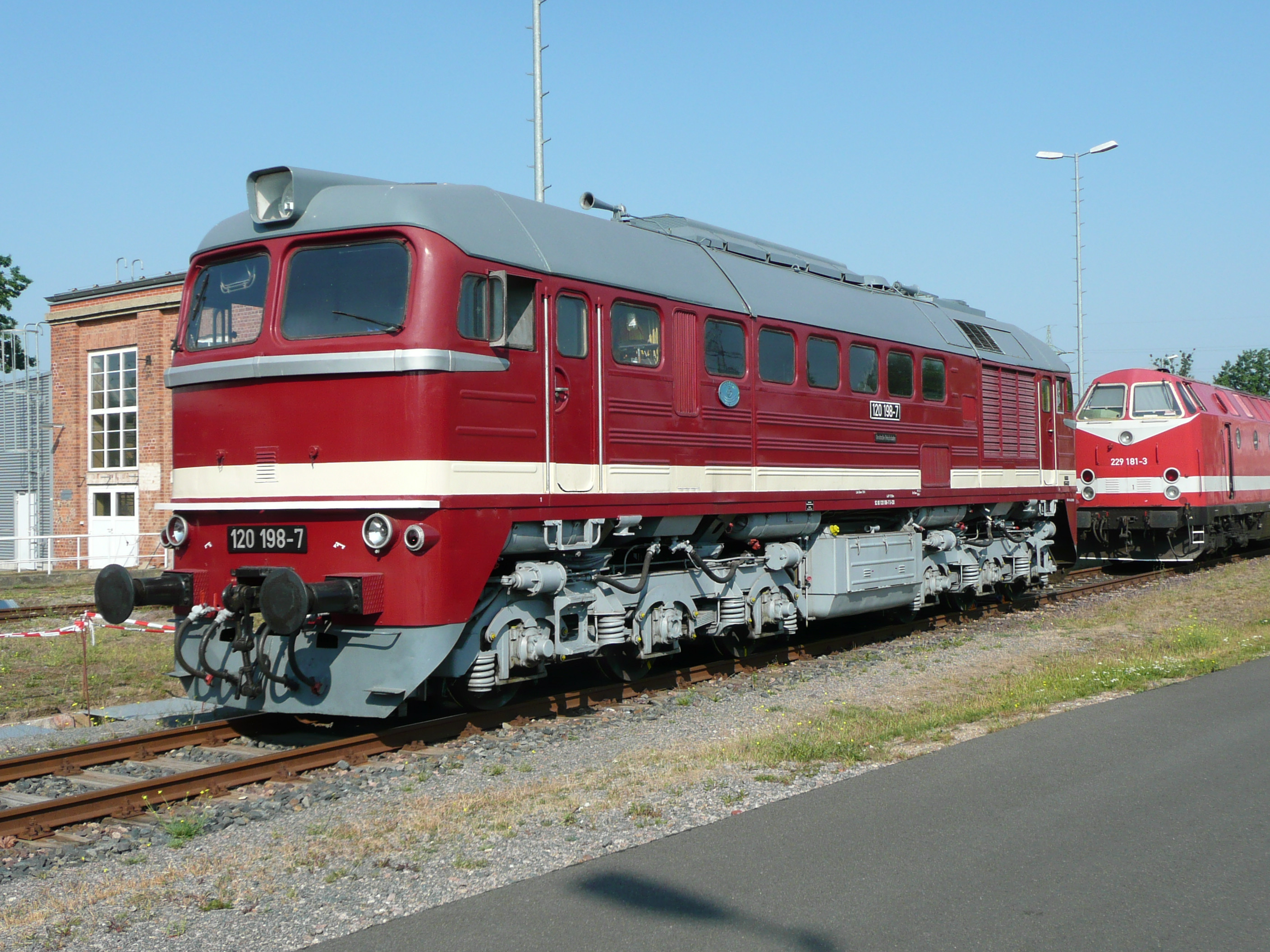 120 198 im AW Dessau